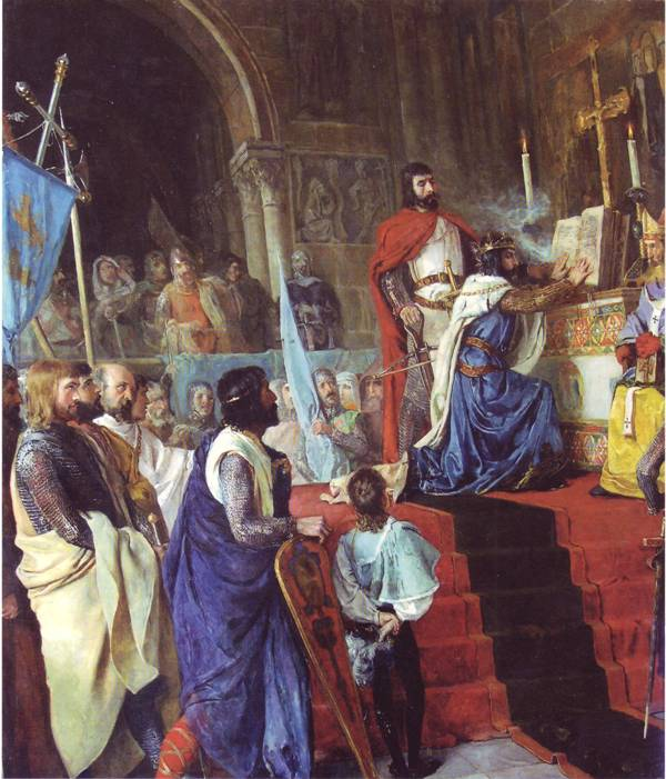 La obra representa la Jura de Santa Gadea, acontecimiento supuestamente histórico ocurrido en el siglo XI, y en la que Alfonso VI, rey de Castilla y León, hubo de jurar ante Rodrigo Díaz de Vivar, llamado "el Cid Campeador", que no había tomado parte en el asesinato de su hermano, el rey Sancho II de Castilla, quien fue asesinado ante los muros de la ciudad de Zamora.